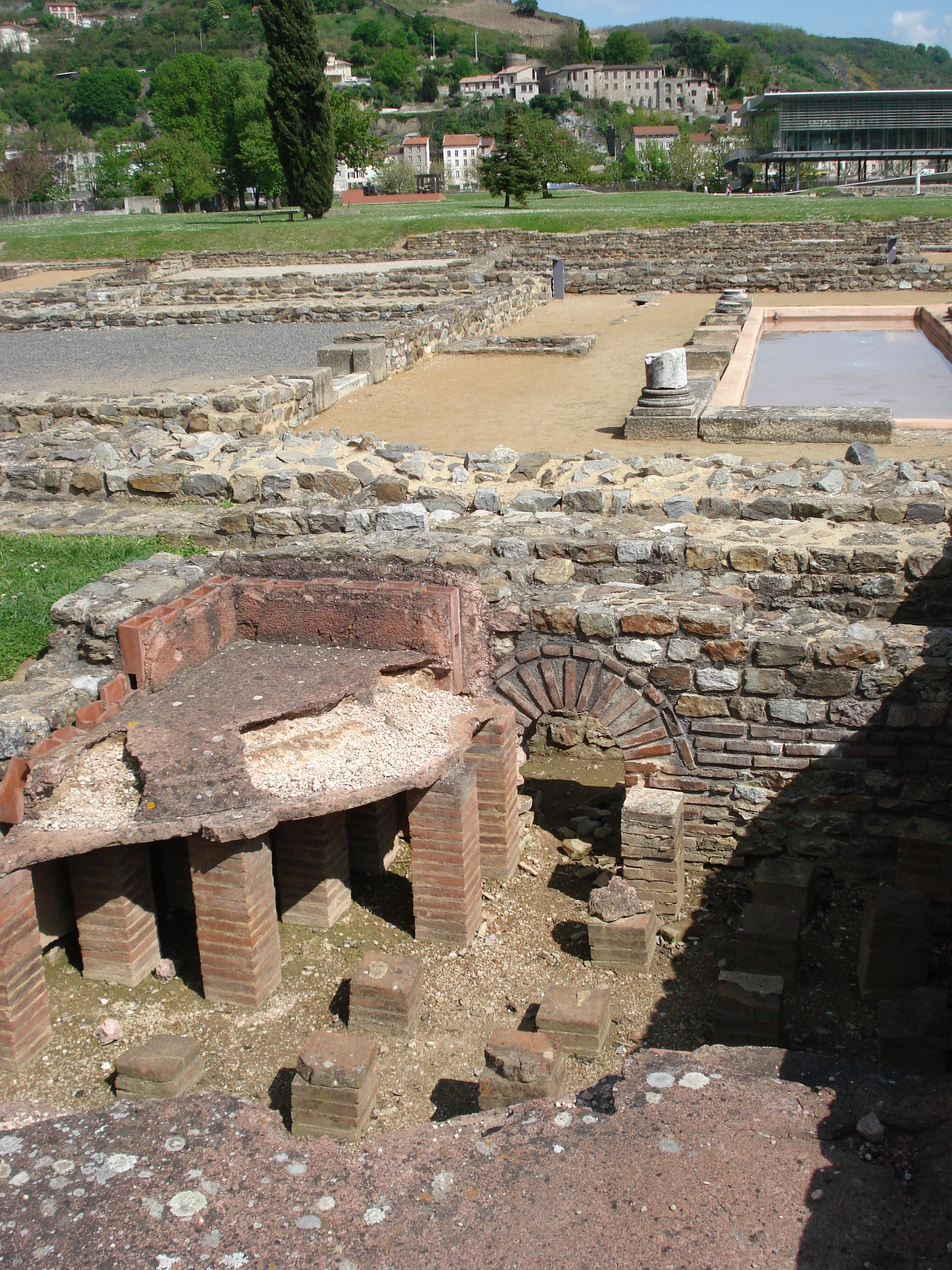 site gallo-romain de Saint-Romain-en-Gal (département du Rhône) situé près de Vienne (Isère) avec système de chauffage à circulation d'air chaud sous le plancher